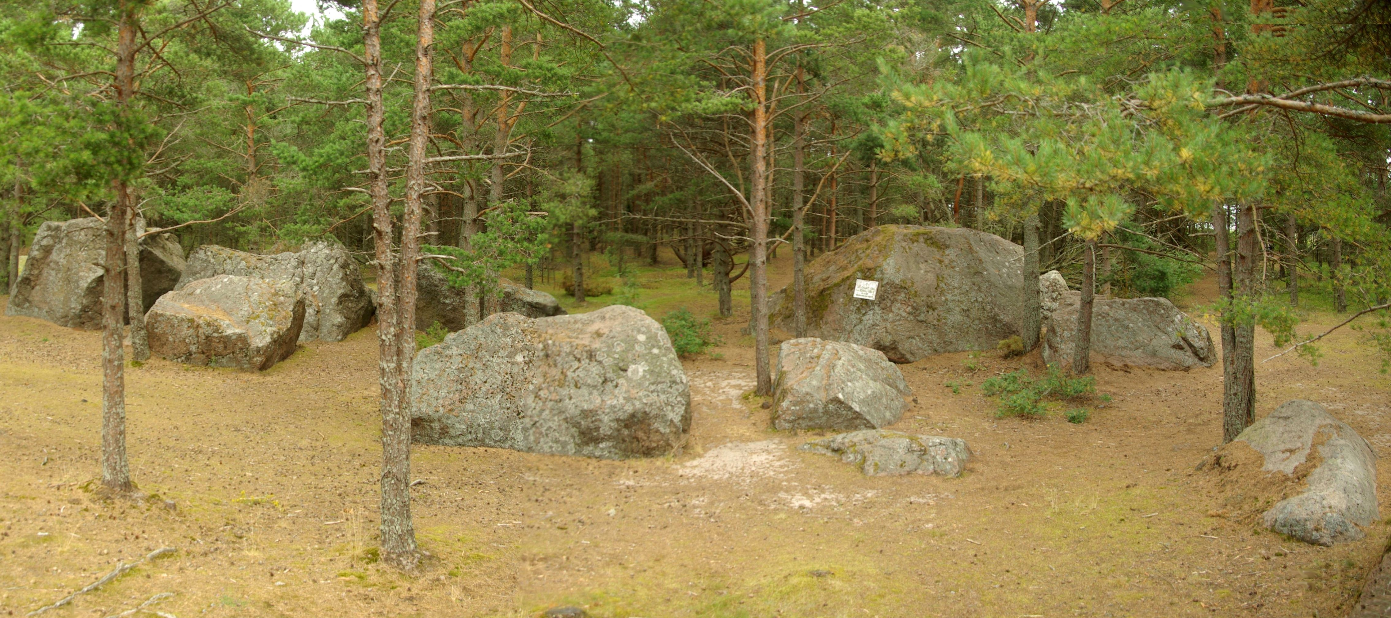 Aegna rändrahnud; Lemmikneeme (Lemmiku) kivikülv